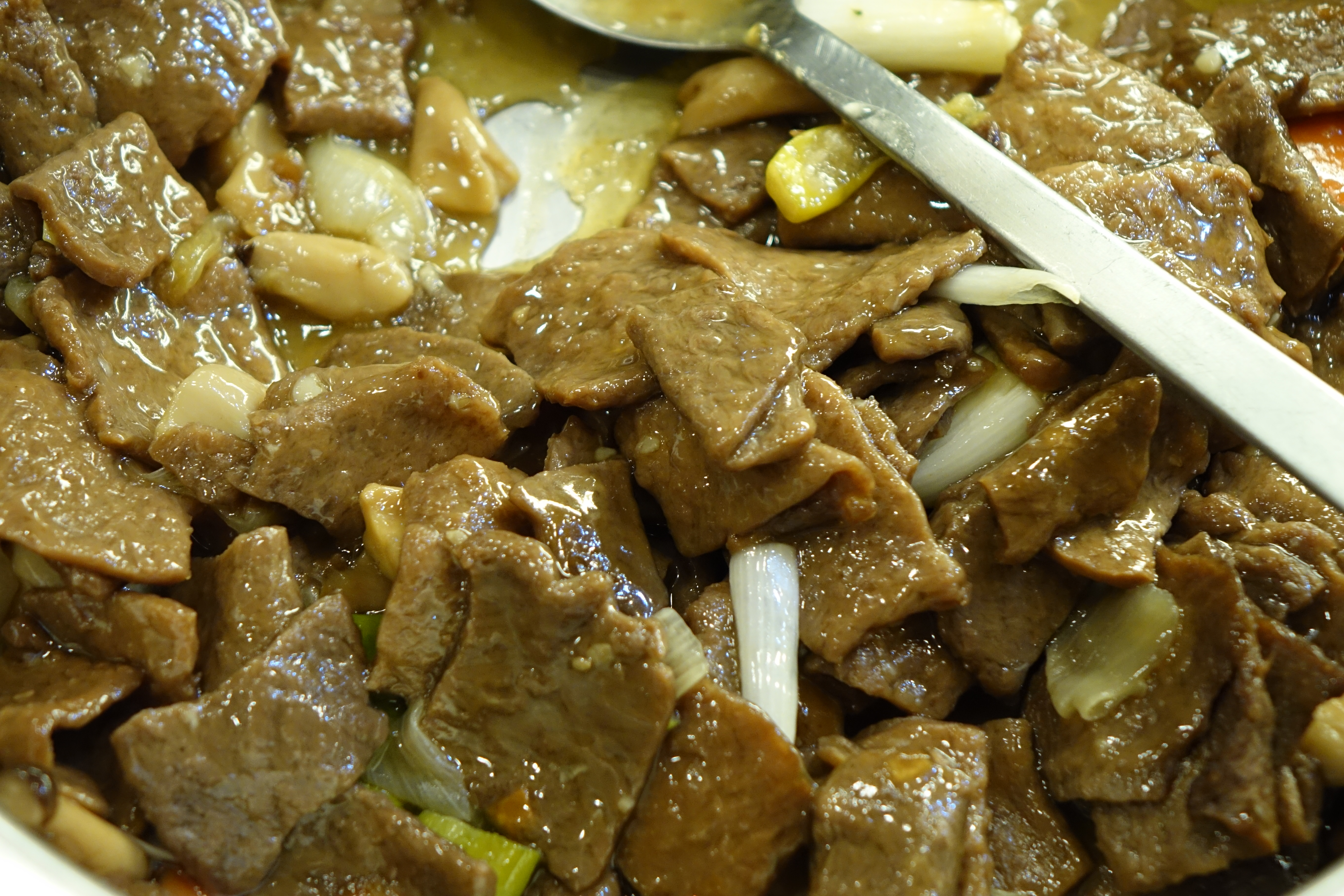 콩으로 만든 고기 모양의 음식